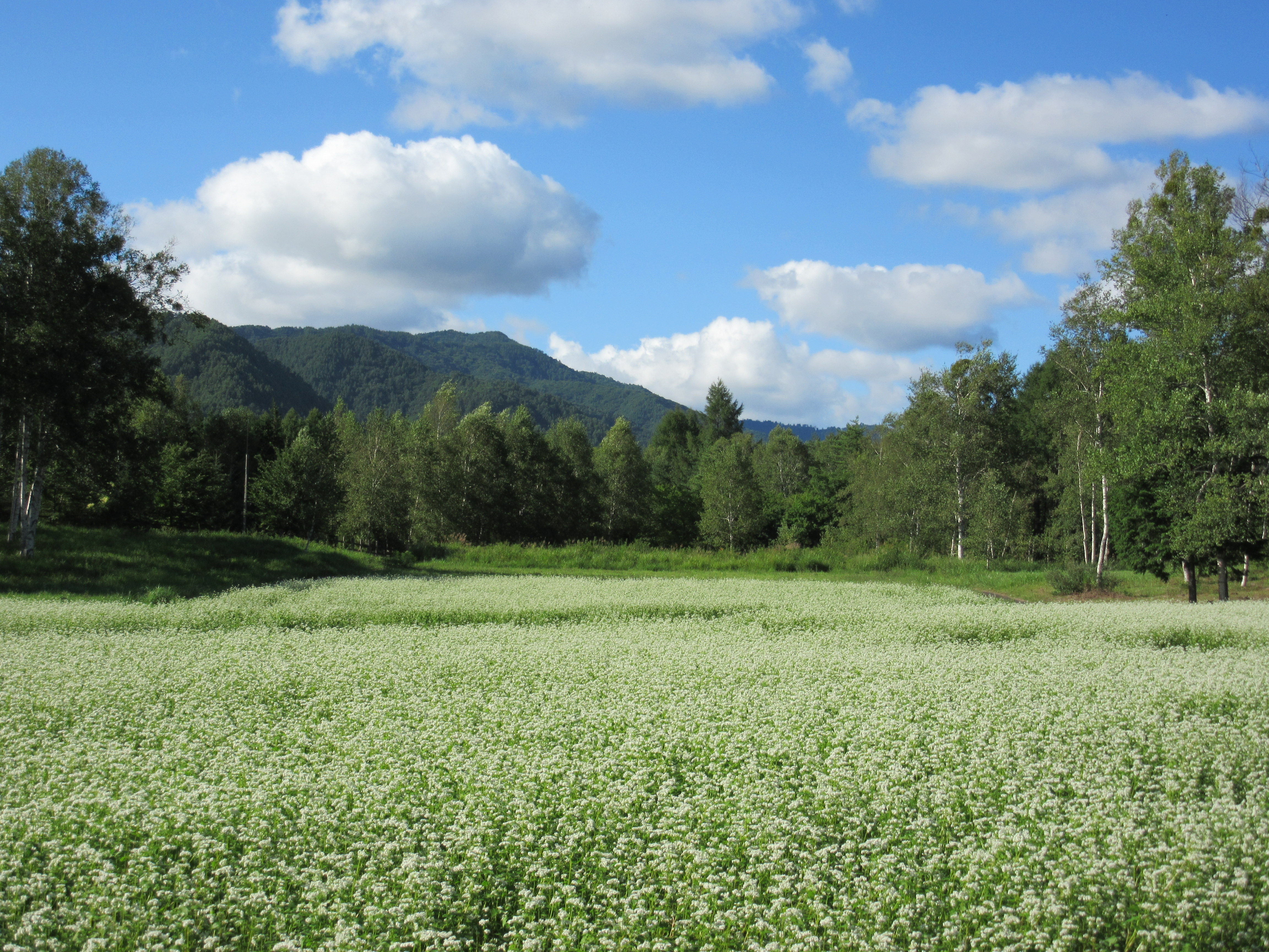 開田高原のソバ畑（木曽馬の里）